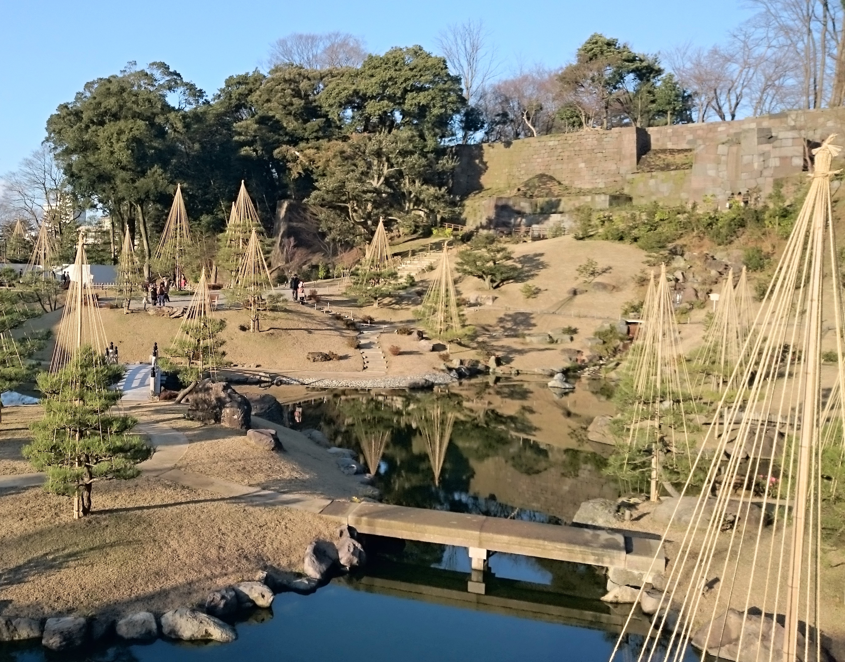 玉泉院丸庭園(復元)